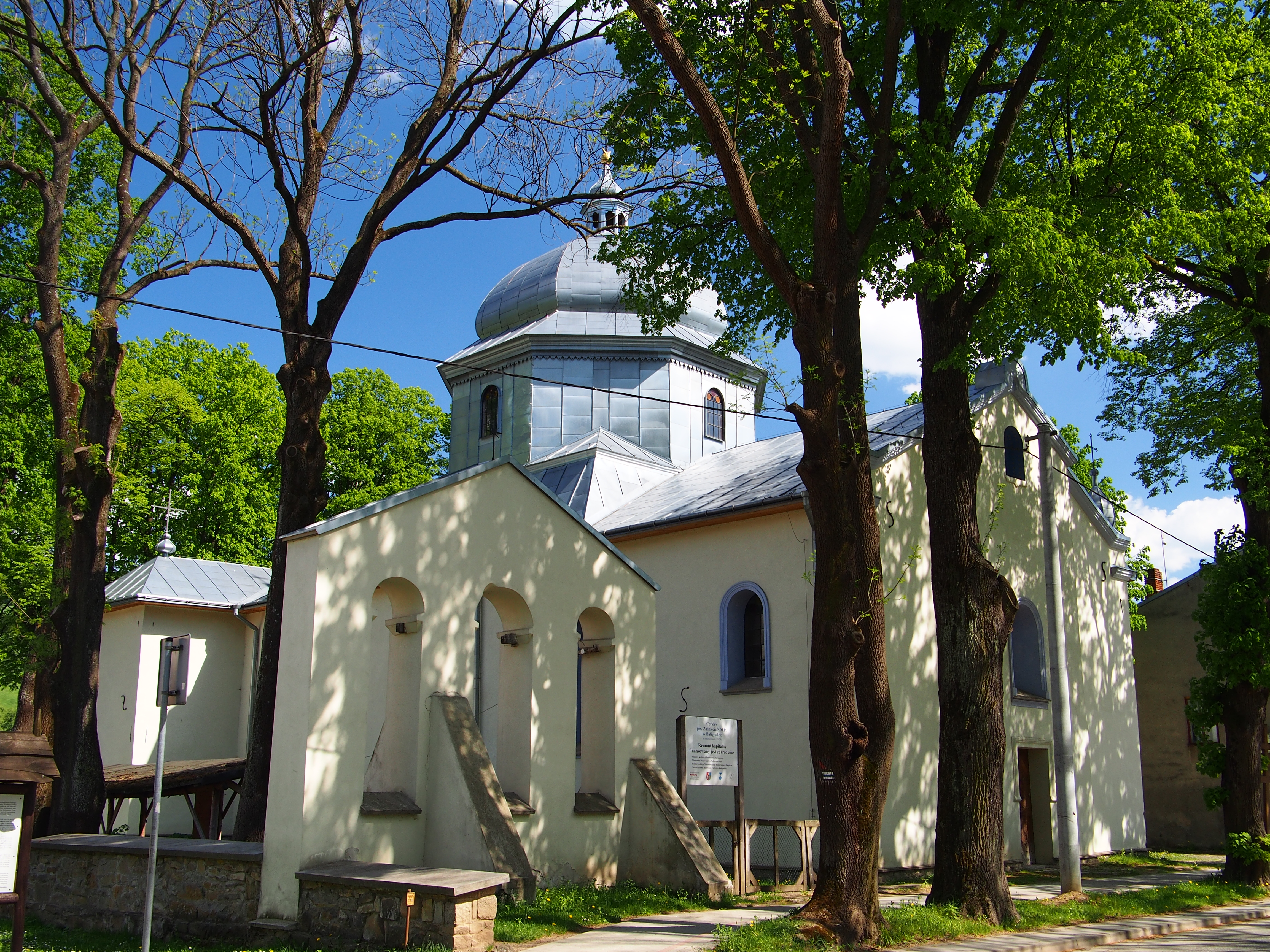 Cerkiew pw. Zaśnięcia NMP, Baligród, pow. leski